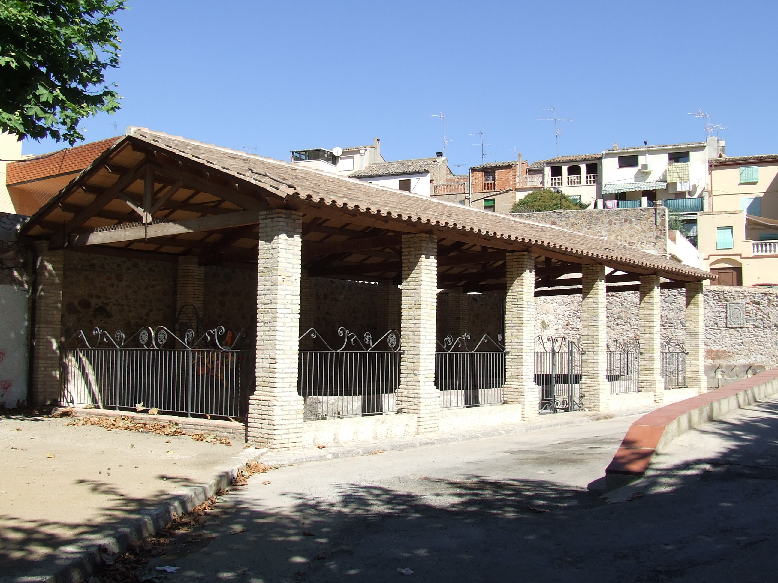 Safareigs públics de Marçà, construïts vers el segle XVIII.